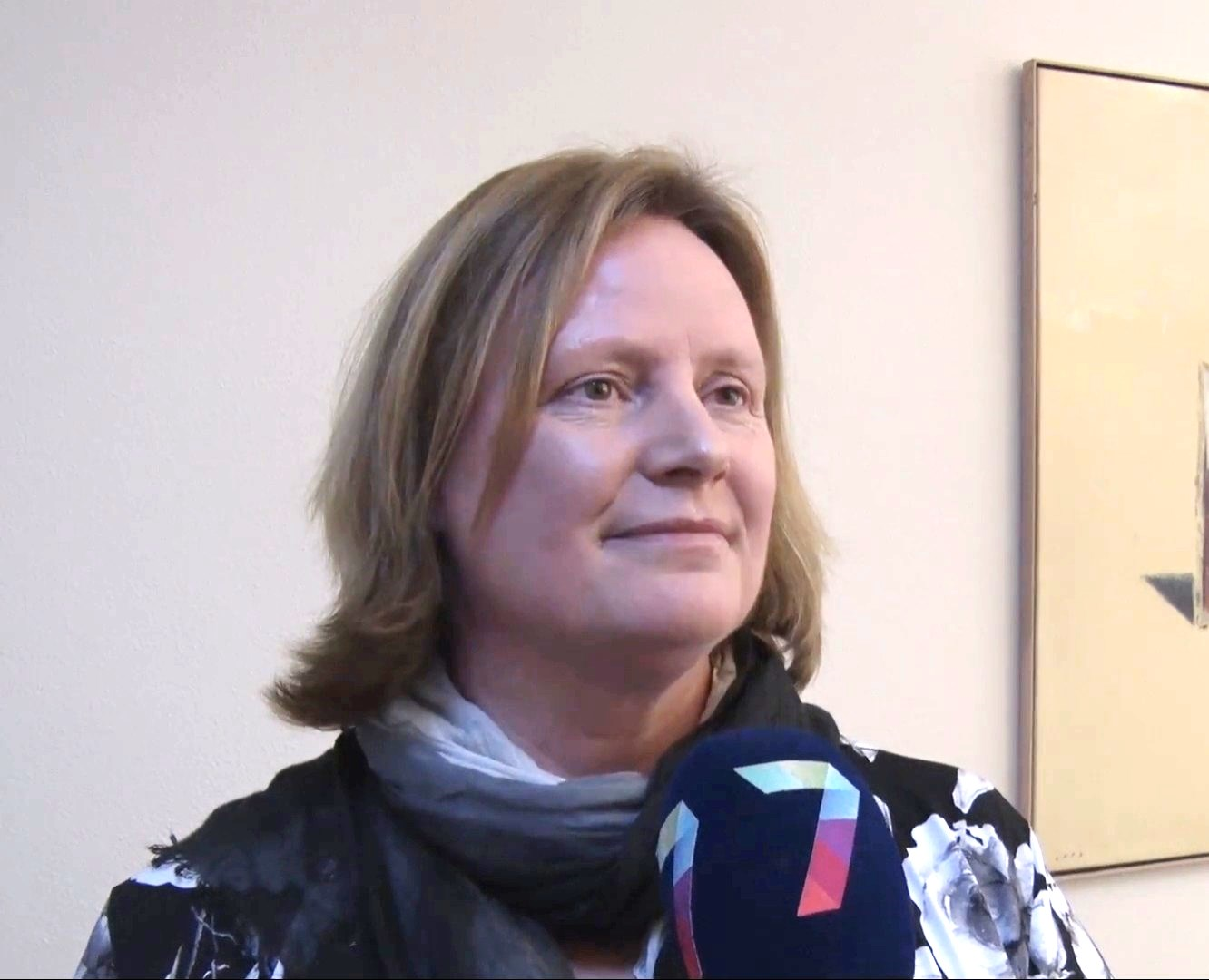 Daphne Bergman, vanaf 11 januari nieuwe burgemeester van Beuningen, heeft er vertrouwen in dat het gaat lukken om een woning te vinden in de gemeente Beuningen. Ze erkent dat er tegenwoordig weinig woningen meer te koop staan, maar ze blijft optimistisch.